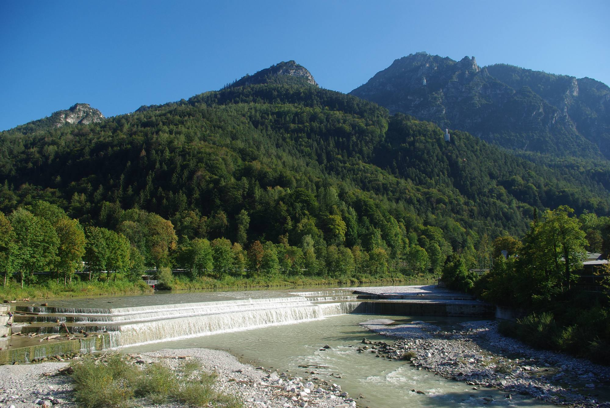 Ehemaliges Triftwehr der Triftanlagen in Bad ReichenhallThis is a photograph of an architectural monument.